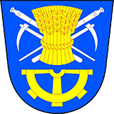 Znak obce Petříkov